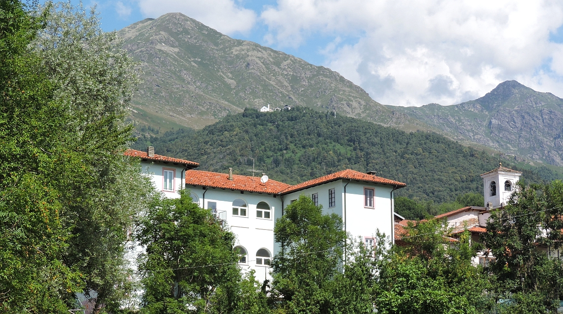 Colleretto Castelnuovo panorama sullo sfondo il santuario di Santa Elisabetta